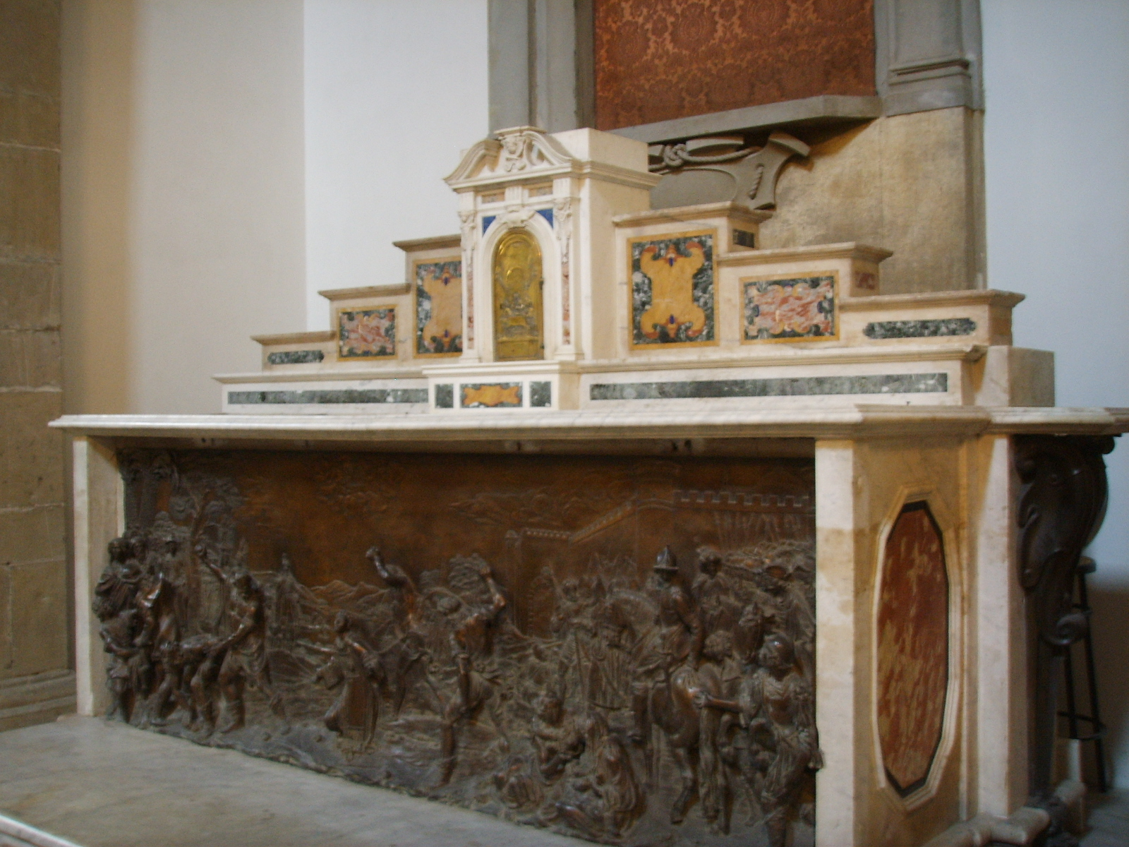 Santo Stefano al Ponte, altare di ferdinando tacca